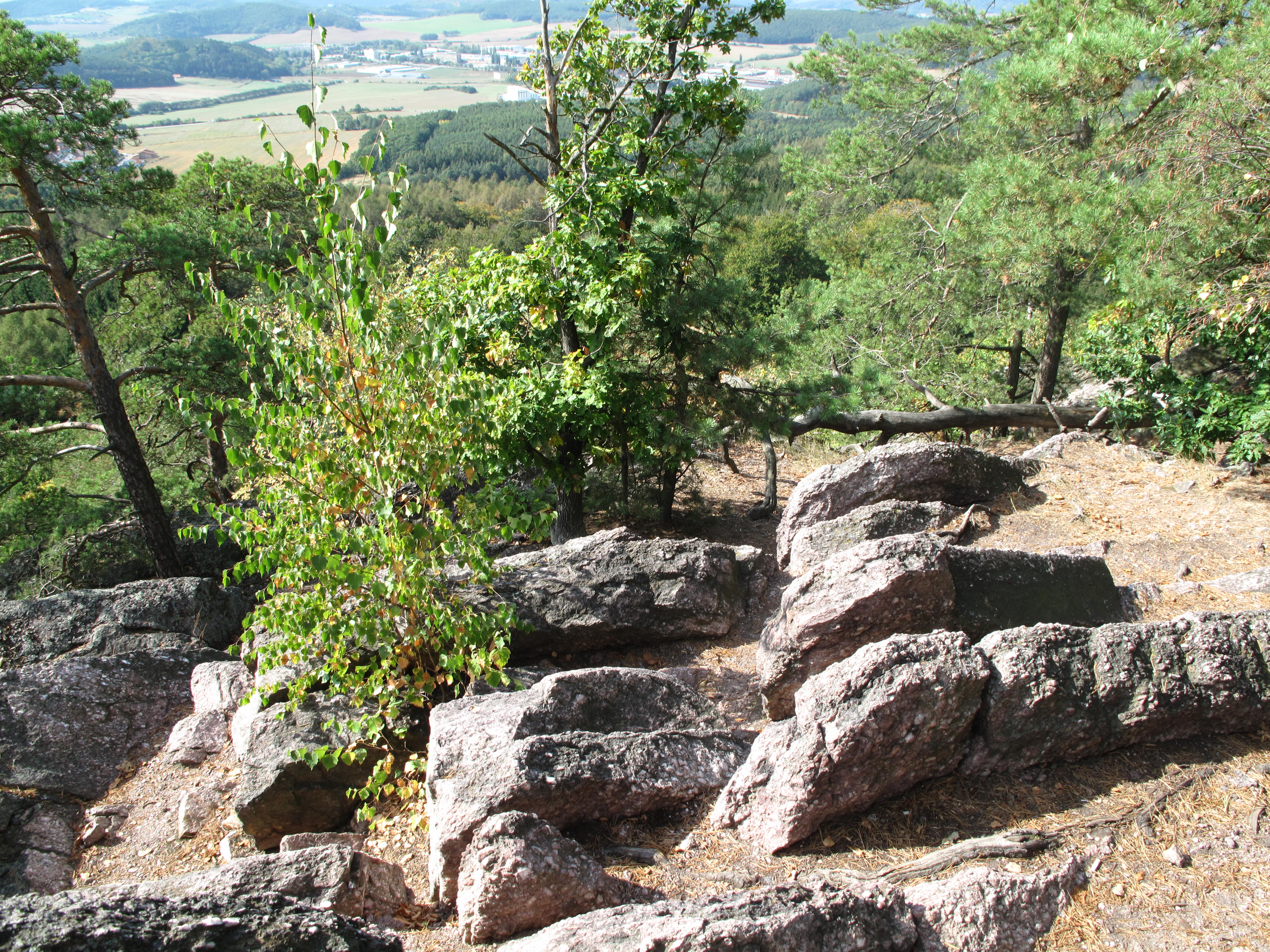 Babí lom